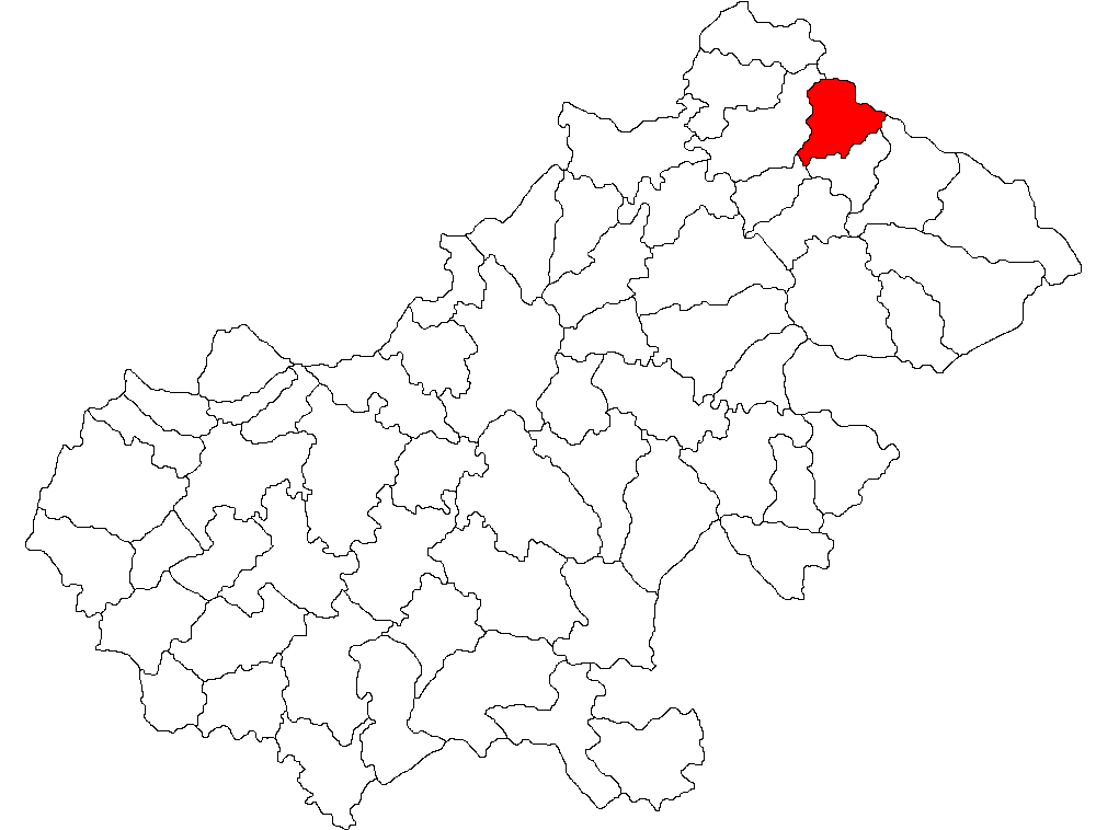 Categorie:Hărţi ale judeţului Satu Mare